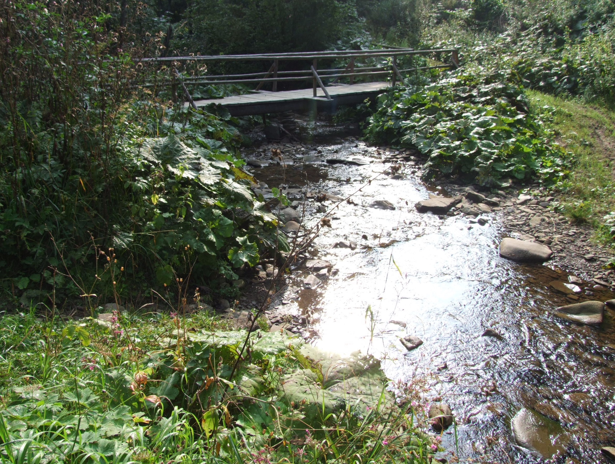 Potok Bystry, dopływ Wołosatego (Bieszczady Zachodnie)